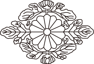 東久邇宮家紋